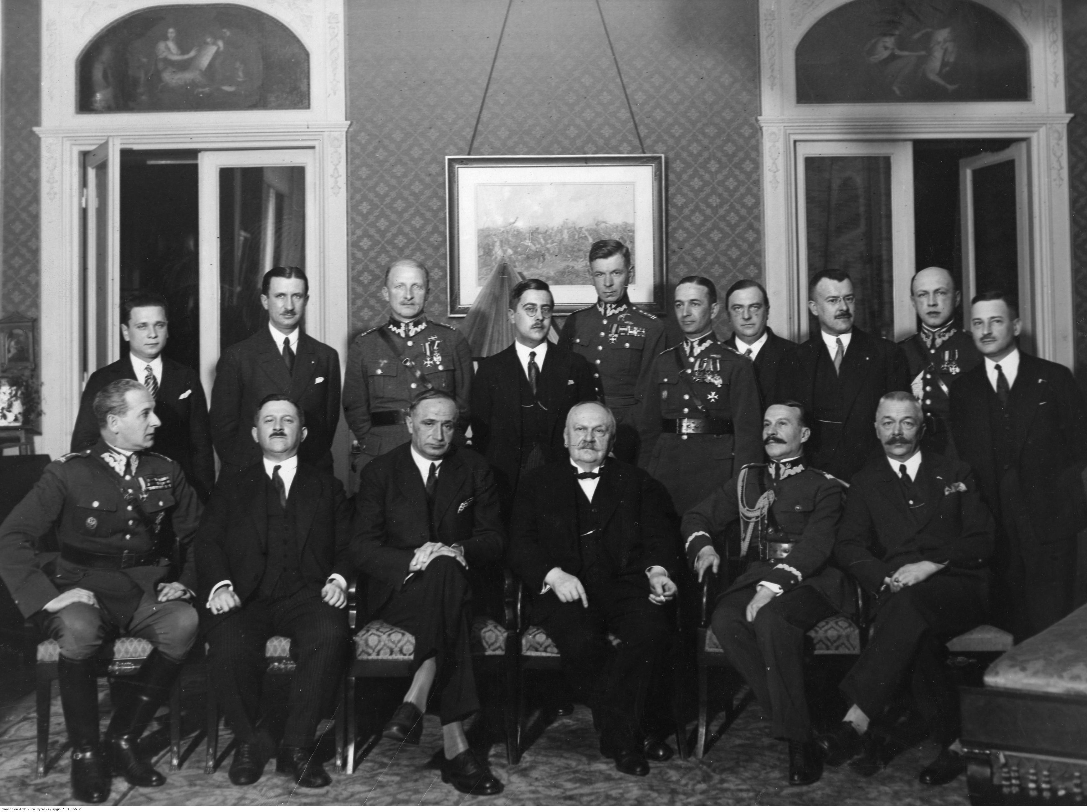 Zebranie koła kawalerów Orderu Królestwa Jugosławii. Uczestnicy zebrania. W pierwszym rzędzie widoczni m.in.: prof. Uniwersytetu Warszawskiego Antoni Gluziński (czwarty z lewej), płk Bolesław Wieniawa-Długoszowski (pierwszy z lewej), poseł nadzwyczajny i minister pełnomocny Polski w Jugosławii Wacław Babiński (drugi z lewej), poseł nadzwyczajny i minister pełnomocny Jugosławii w Polsce Branko Lazarević (trzeci z lewej), gen. Kazimierz Pławski (piąty z lewej), Szpakowski. W drugim rzędzie widoczni: płk Rottowski, płk. Ludomił Rayski, Przyjemski, kpt. Łoza, mjr. Stanisław Próchnicki, Bogusławski. Koncern Ilustrowany Kurier Codzienny - Archiwum Ilustracji. Sygnatura: 1-D-955-2